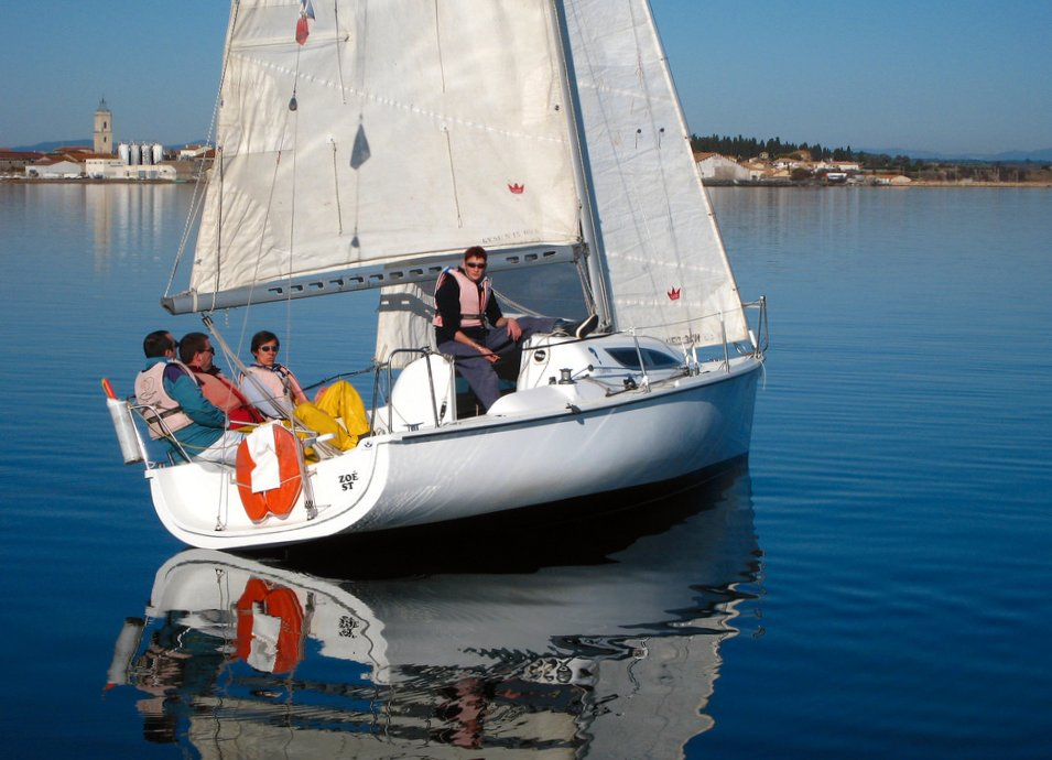 Segeln im Januar bei Windstille vor Marseillan (Frankreich / Mittelmeer): ein Boot (ohne Hilfsmotor) der Segelschule les Glénans